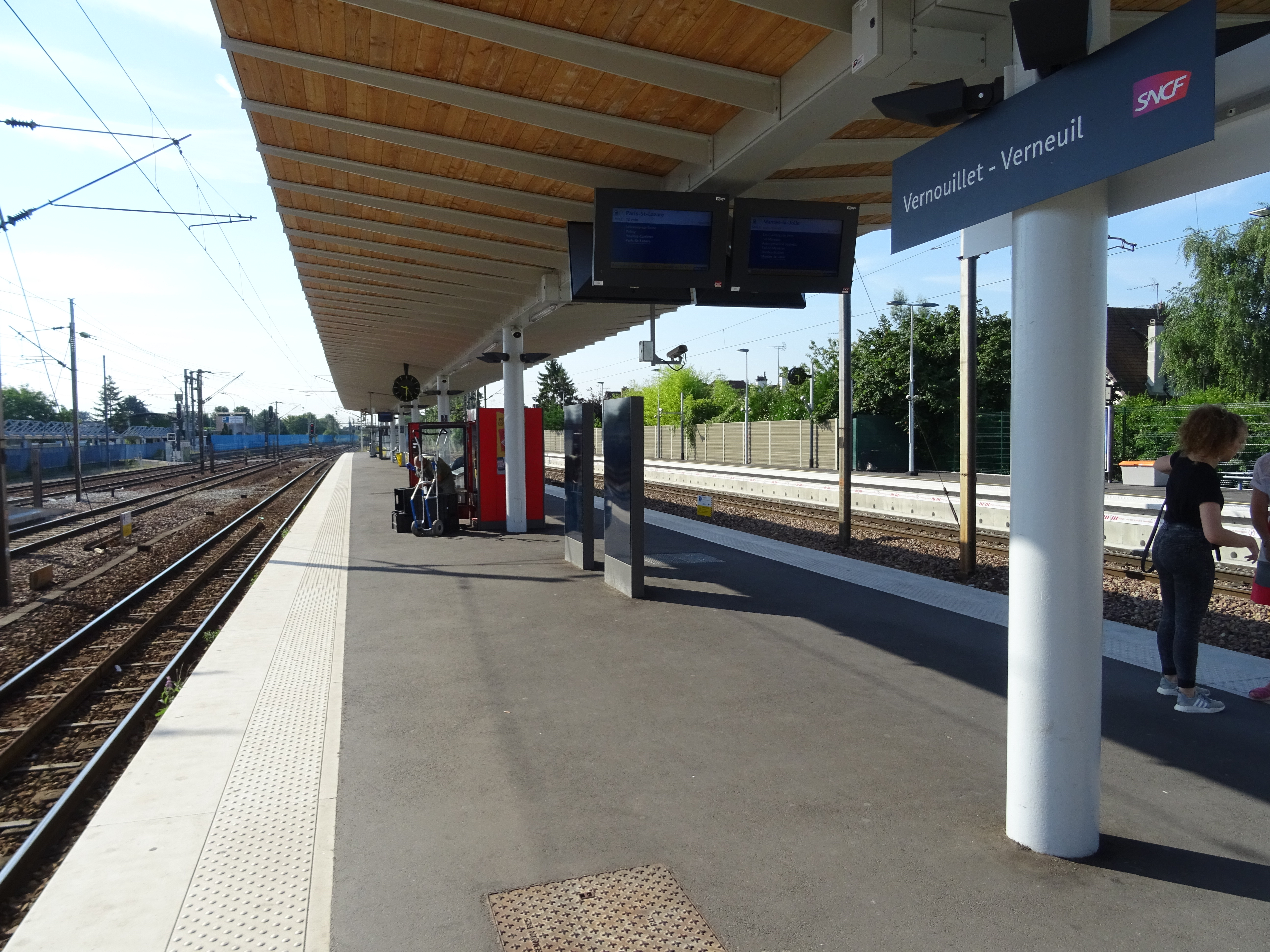 Quais vus du côté Vilennes/paris